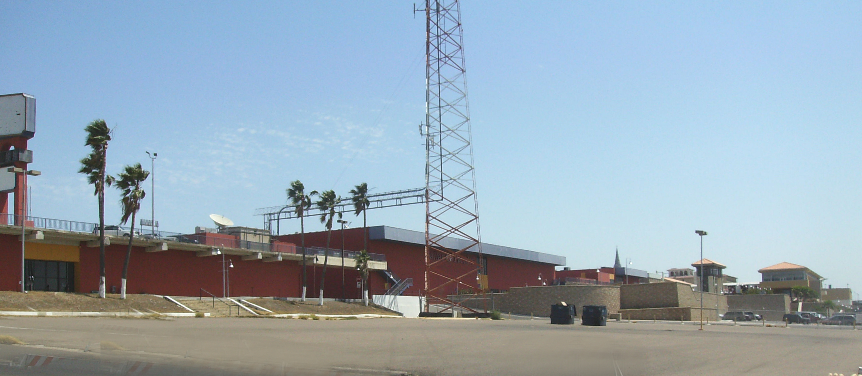 El Portal Mall (east side)